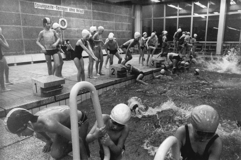 Berlin, Pankow, Schwimmhalle, Hallenbad ADN-ZB Katscherowski 6.2.75 Berlin: Neue Volksschwimmhalle übergeben-Eine Tummelstätte für "Wasserratten" ist die am 6.2.75 in Berlin-Pankow übergebene Volksschwimmhalle.Die neue Halle verfügt über 25-Meter-Bahnen,ein Lehrschwimmbecken mit 100m² Wasserfläche und eine Sauna.Sie ist nach der Anlage in der Friedensstraße die zweite derartige neue Volksschwimmhalle für die Bevölkerung der Hauptstadt.(vergl.dazu P0206-33N)